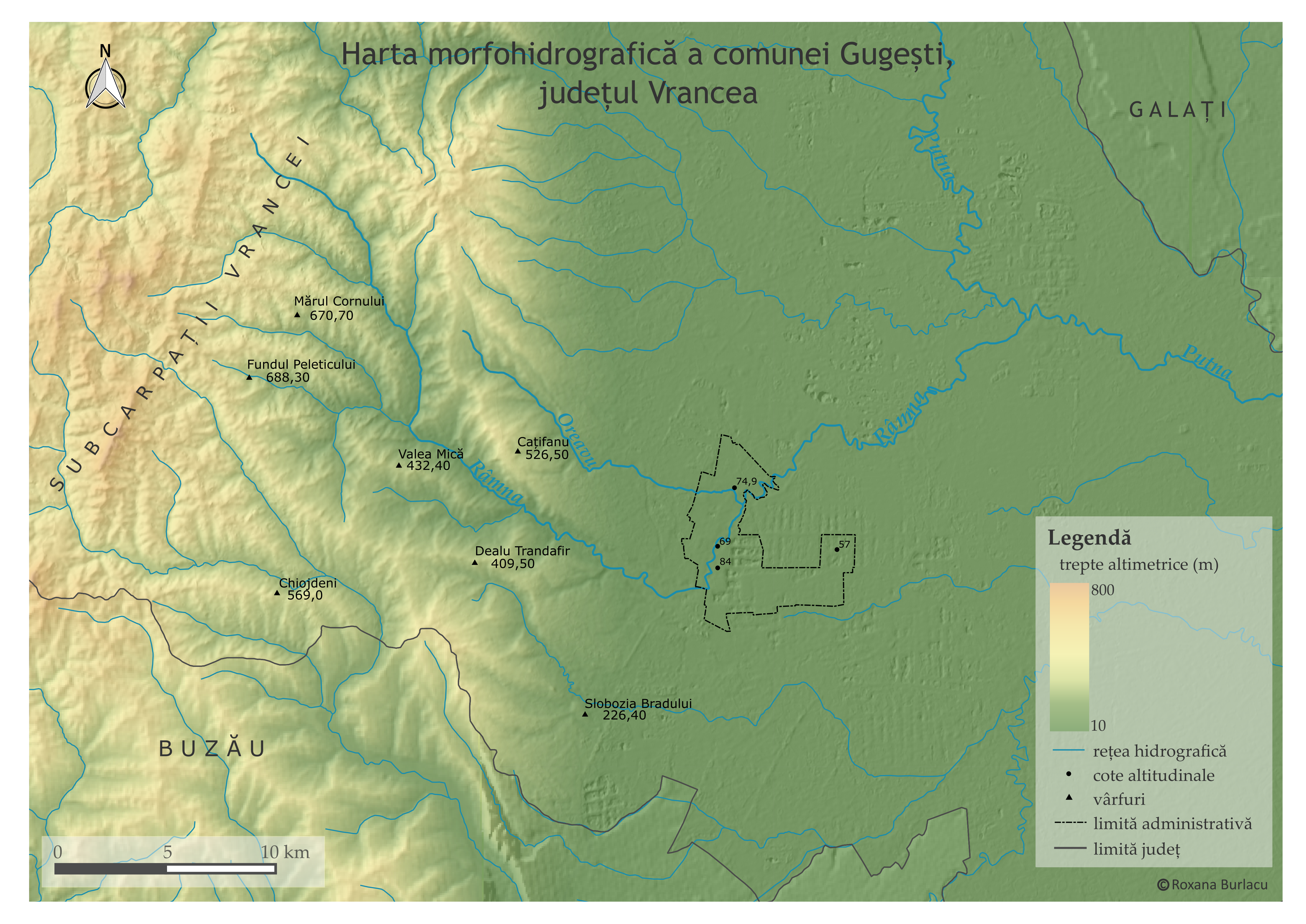 Reprezentarea reliefului în comuna Gugești și împrejurimi, împreună cu reprezentarea celor mai importante cote din zonă.